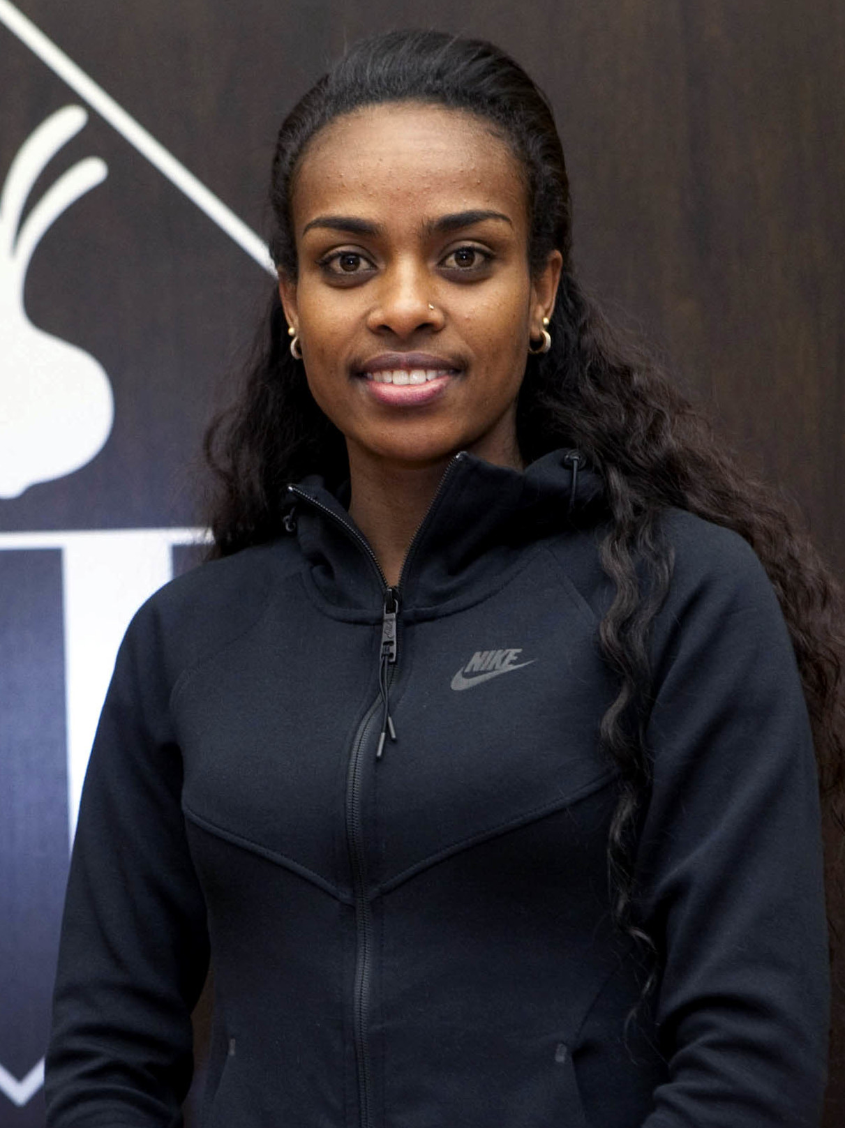 La corredora Genzebe Dibaba, considerada millor atleta del 2015, participa el divendres a la tarda en el míting de commemoració del centenari de la Federació Catalana d’Atletisme a la Pista Coberta.